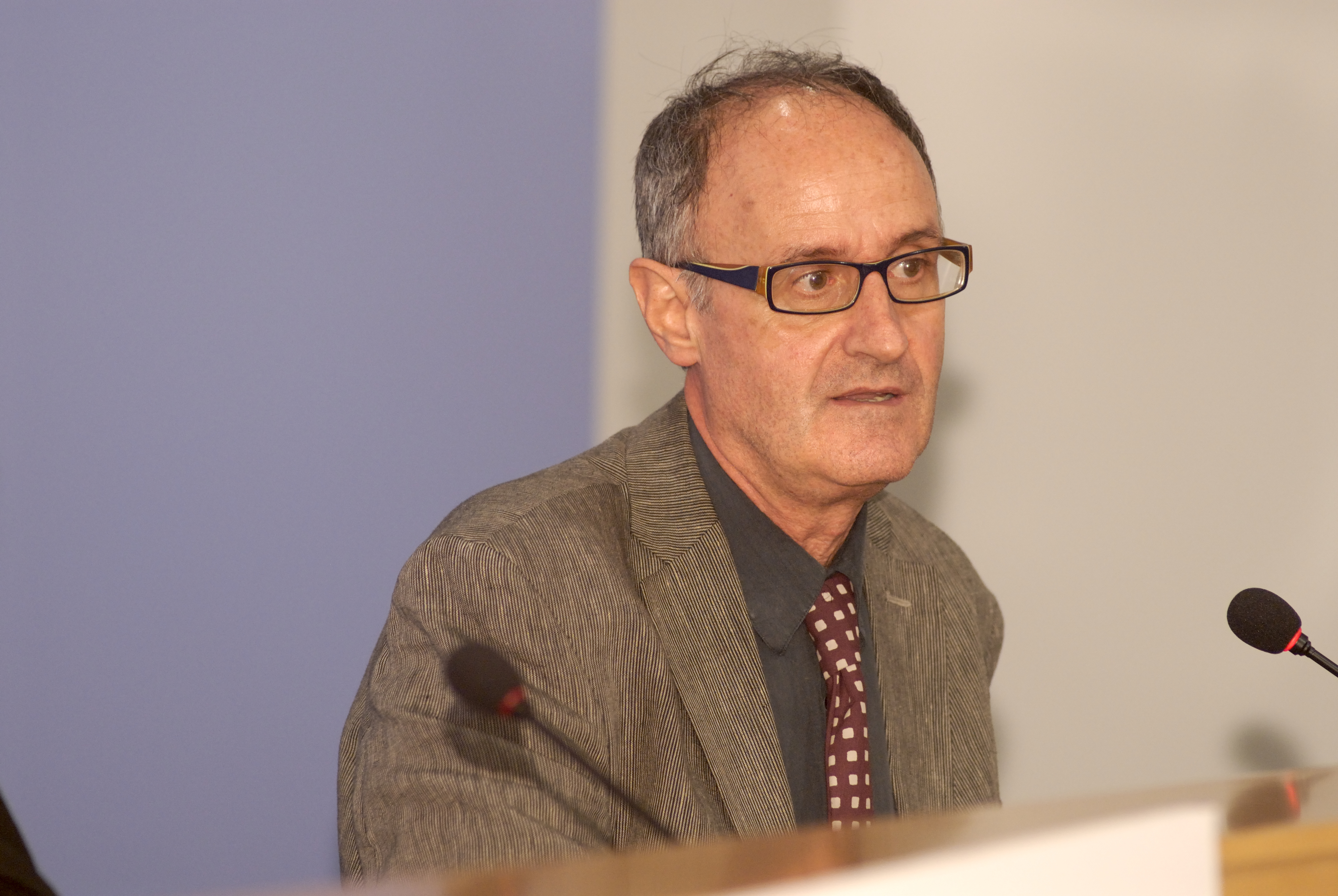 Pep Cruanyes al MHC el 2008.